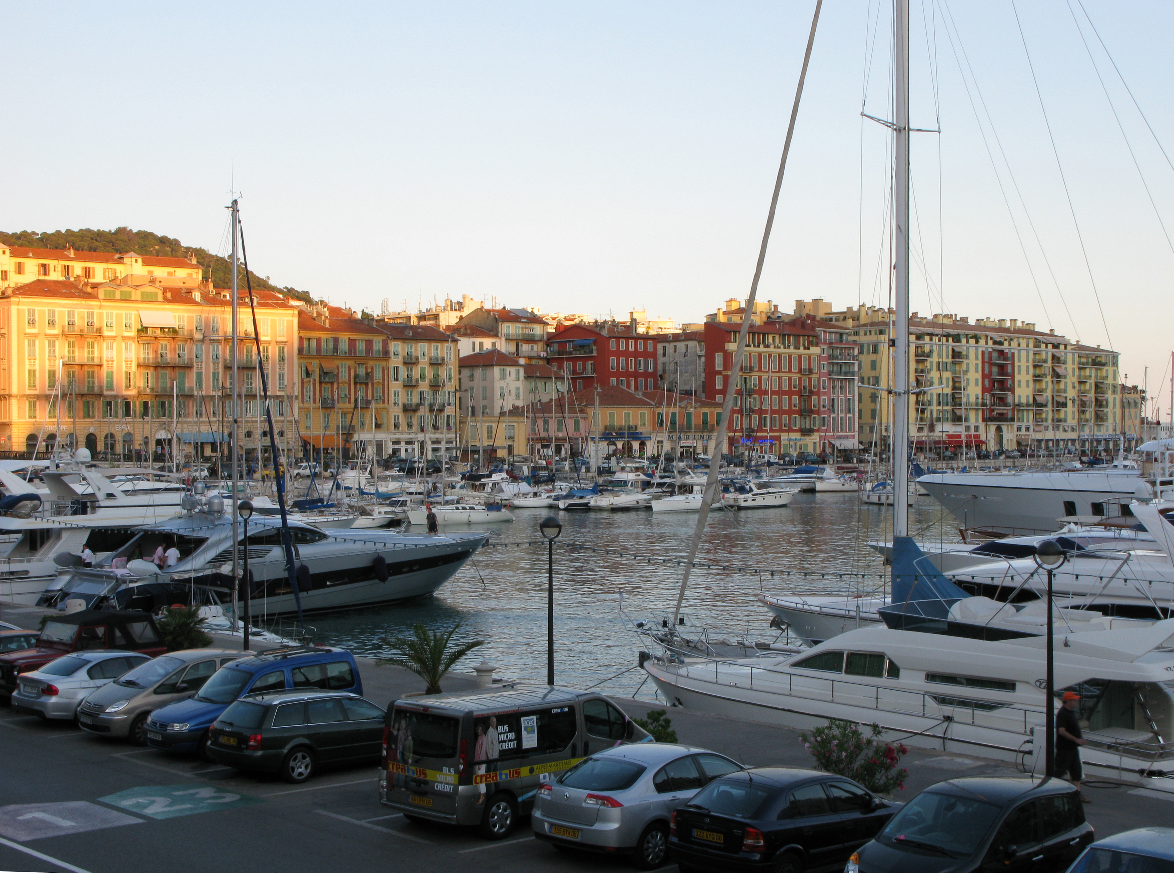 Photographie d'une partie du port Lympia à Nice, France. Photograph of a part of port Lympia in Nice, France.